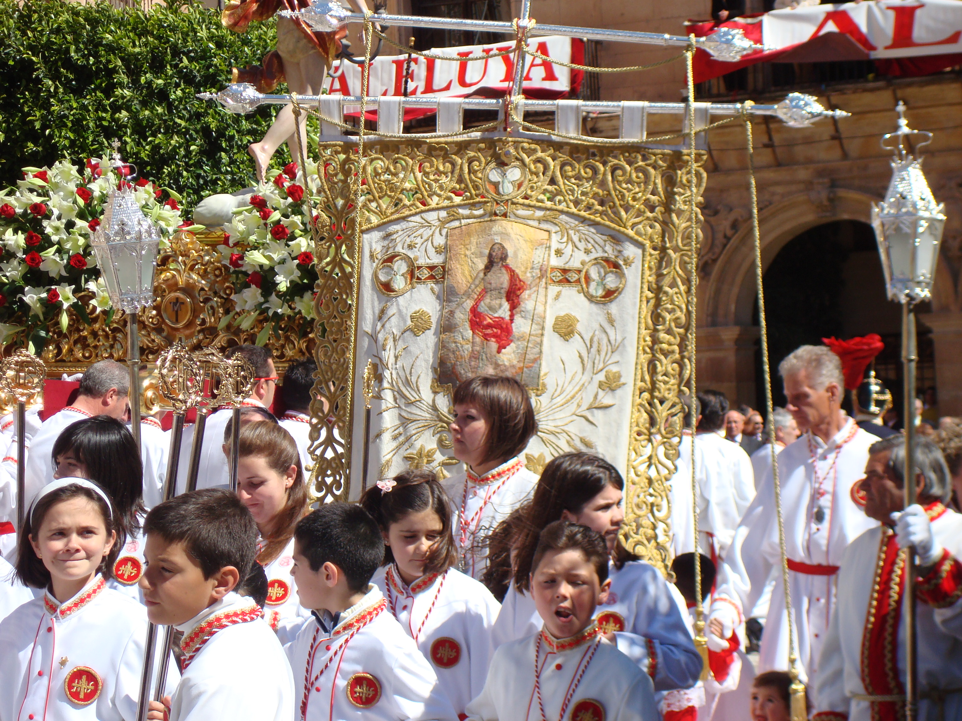 Archicofradia de Jesús Resucitado